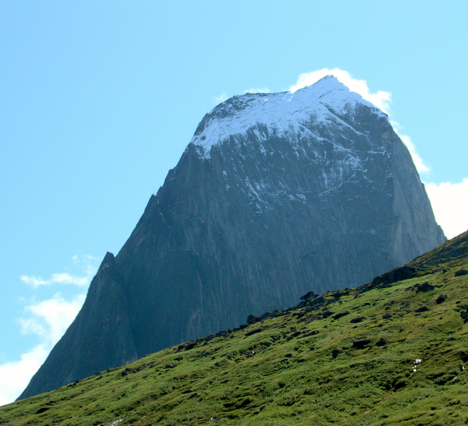 Ketil West Face